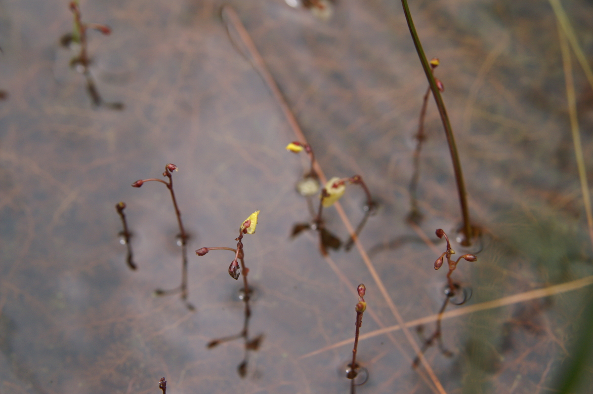 Mala mešinka v Žejni dolini (Hotederščica).